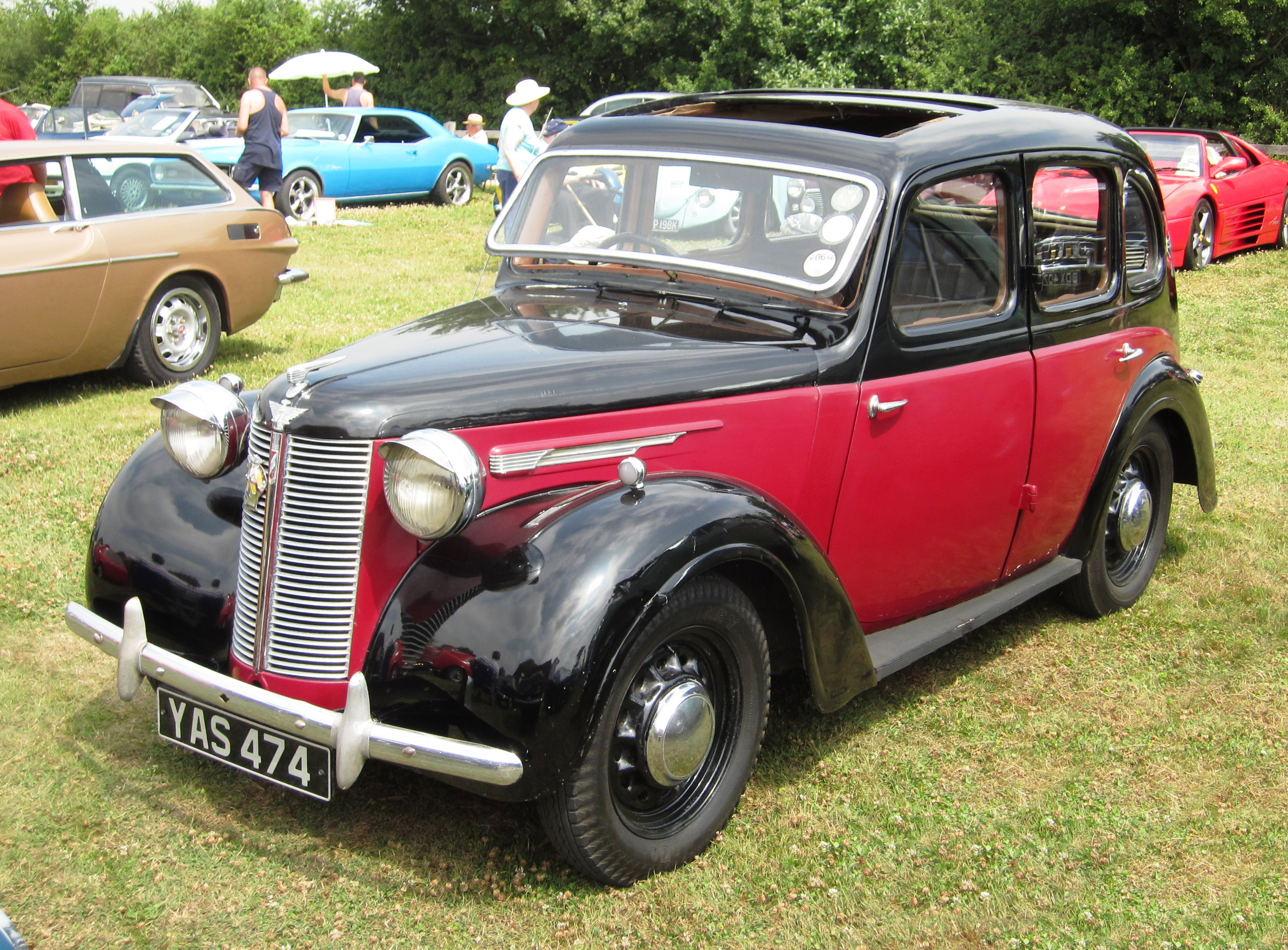 Austin 10 (1947)